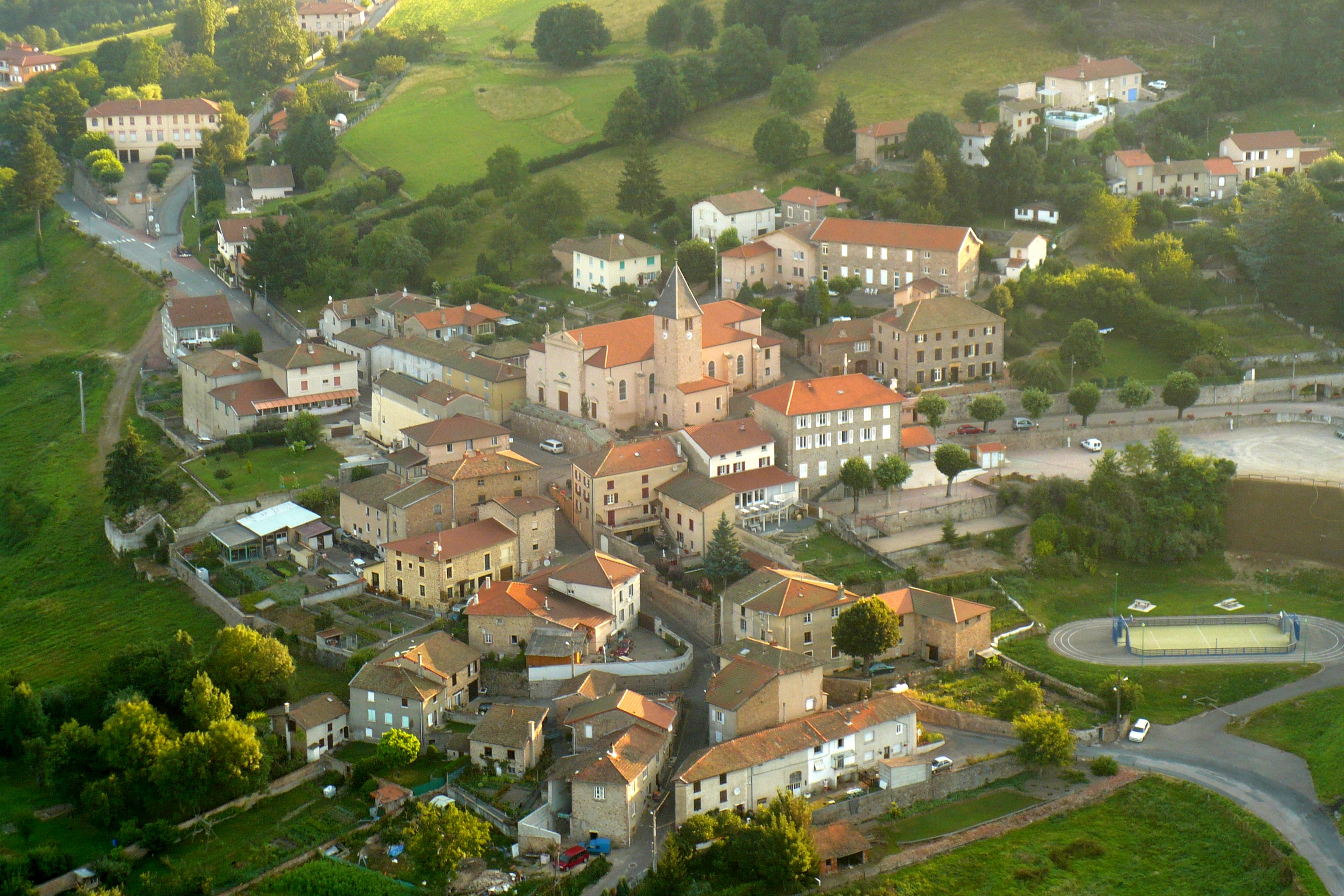 Le village de Mardore vue de montgolfière